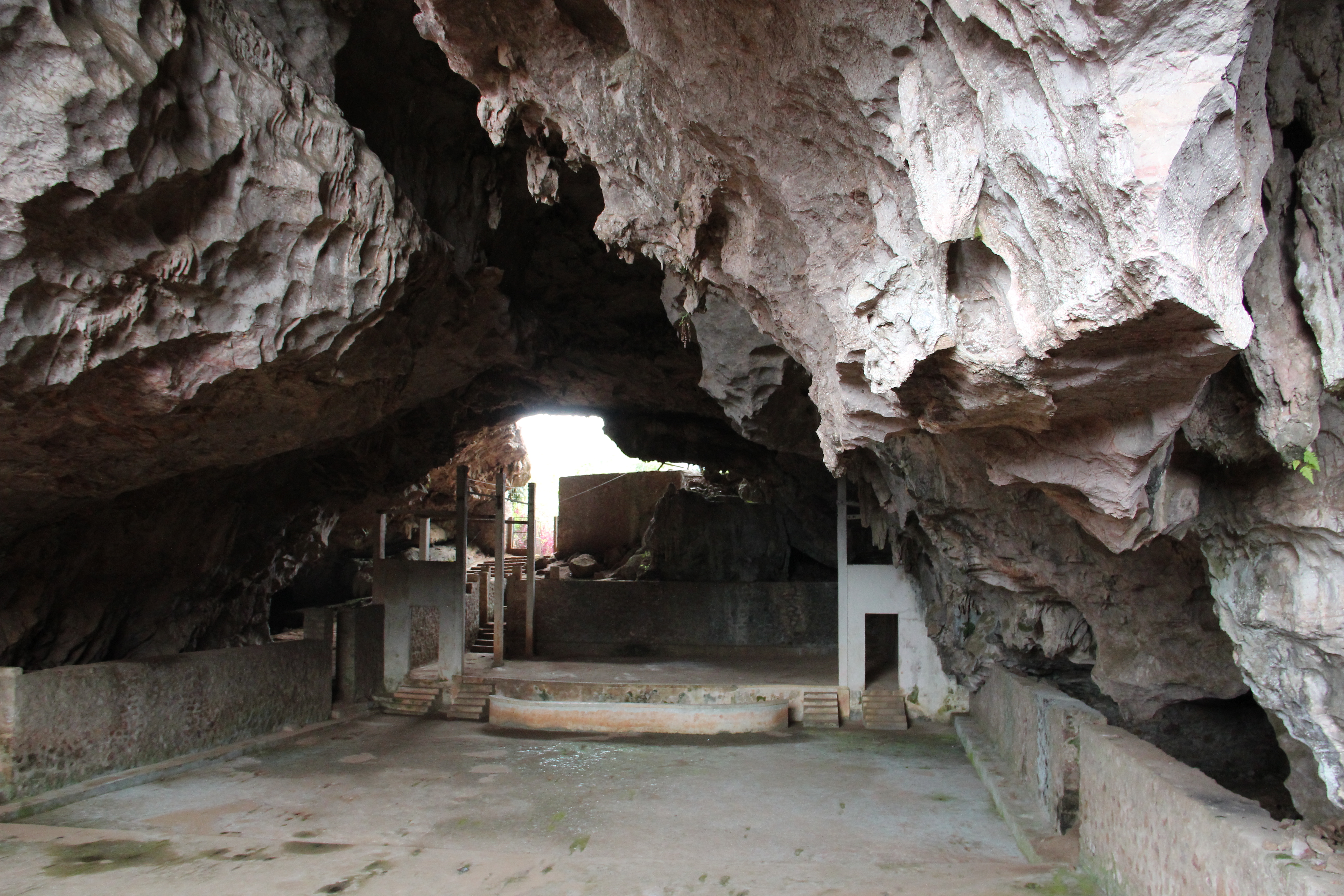 Grotte de Viengxay ayant accueilli des spectacles (théâtre, cinéma, mariages) durant la guerre civile laotienne.